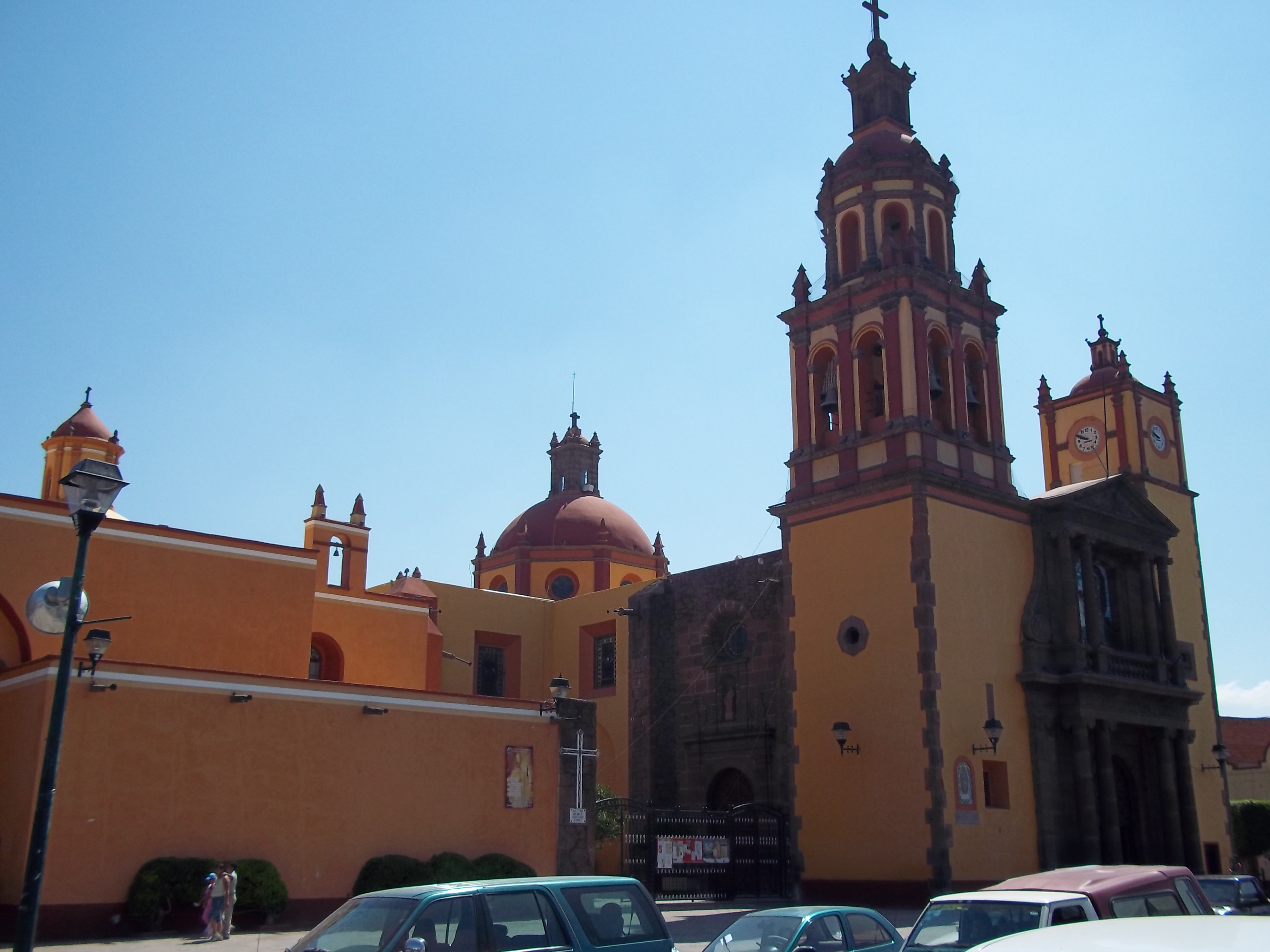 Parroquia de San Juan del rio